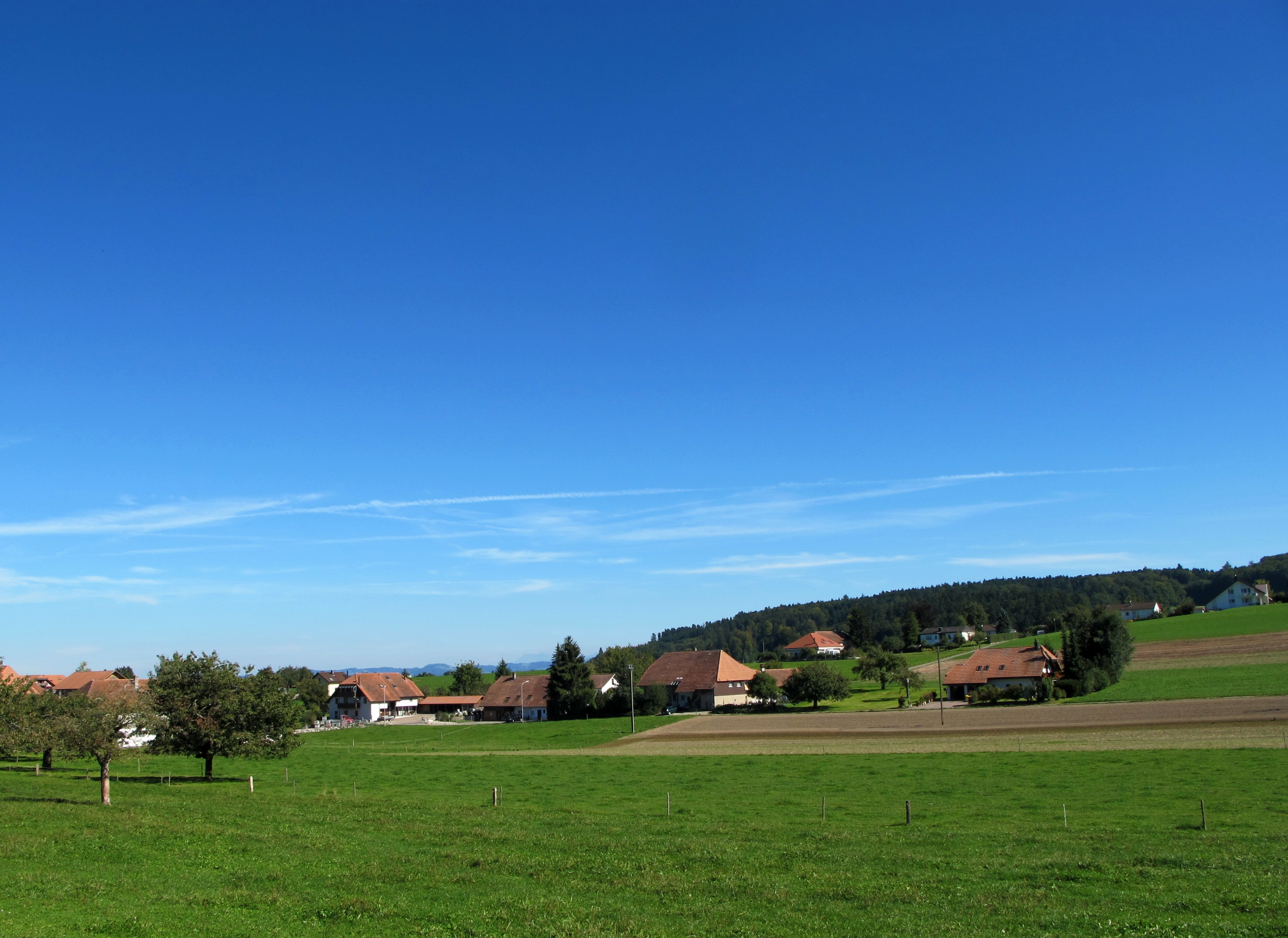 Tscheppach von nordwesten